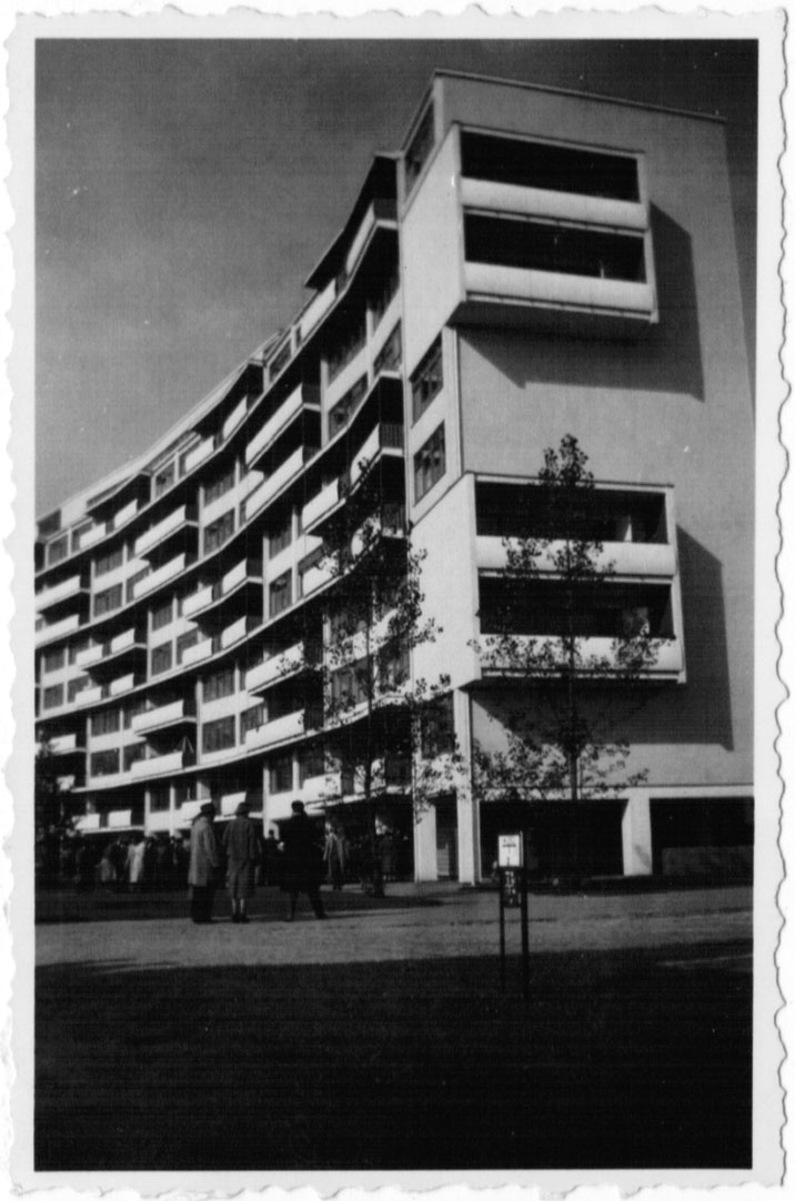 Internationale Bauausstellung in Berlin im Jahr 1957. Beitrag von Gropius